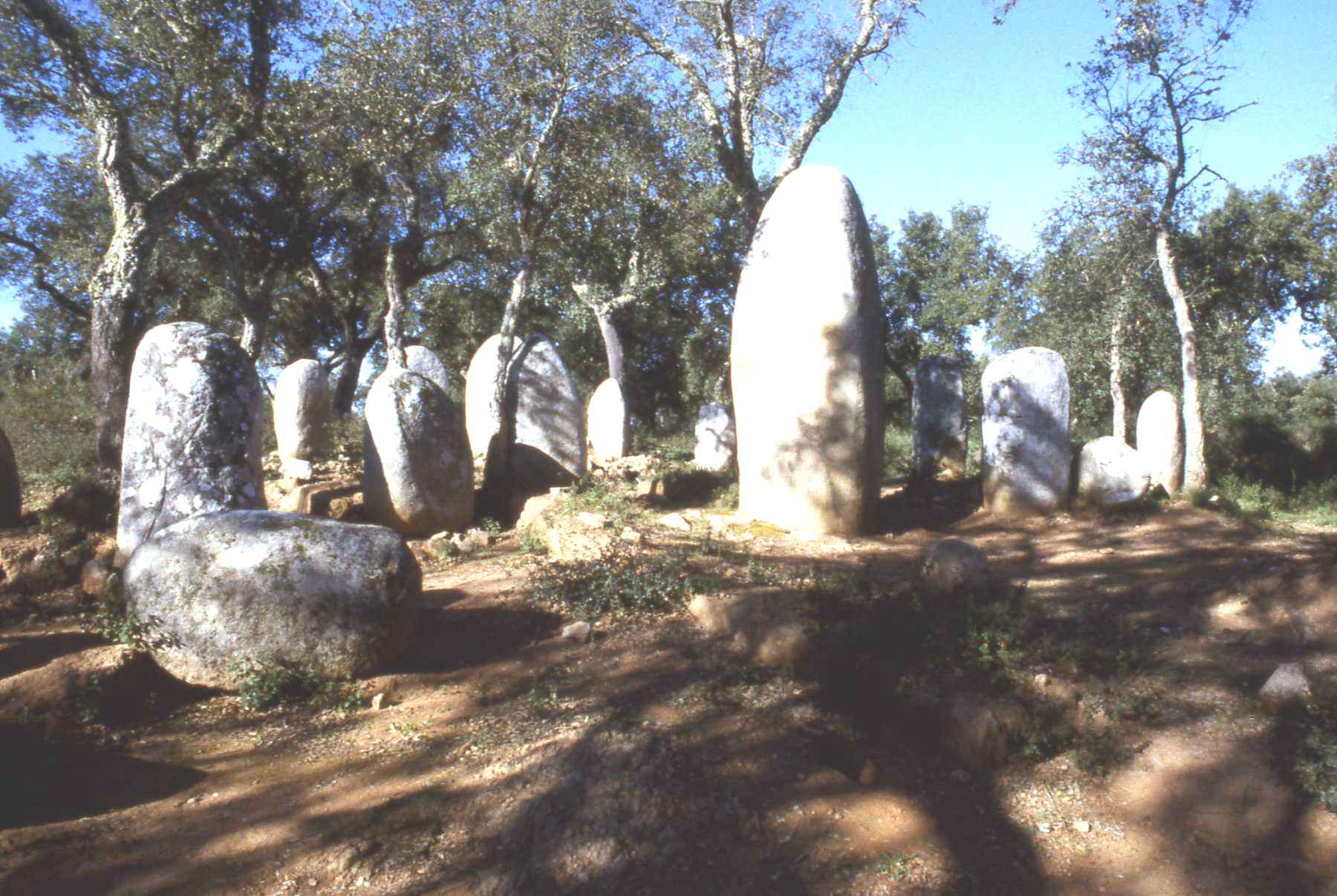 dos Mogos